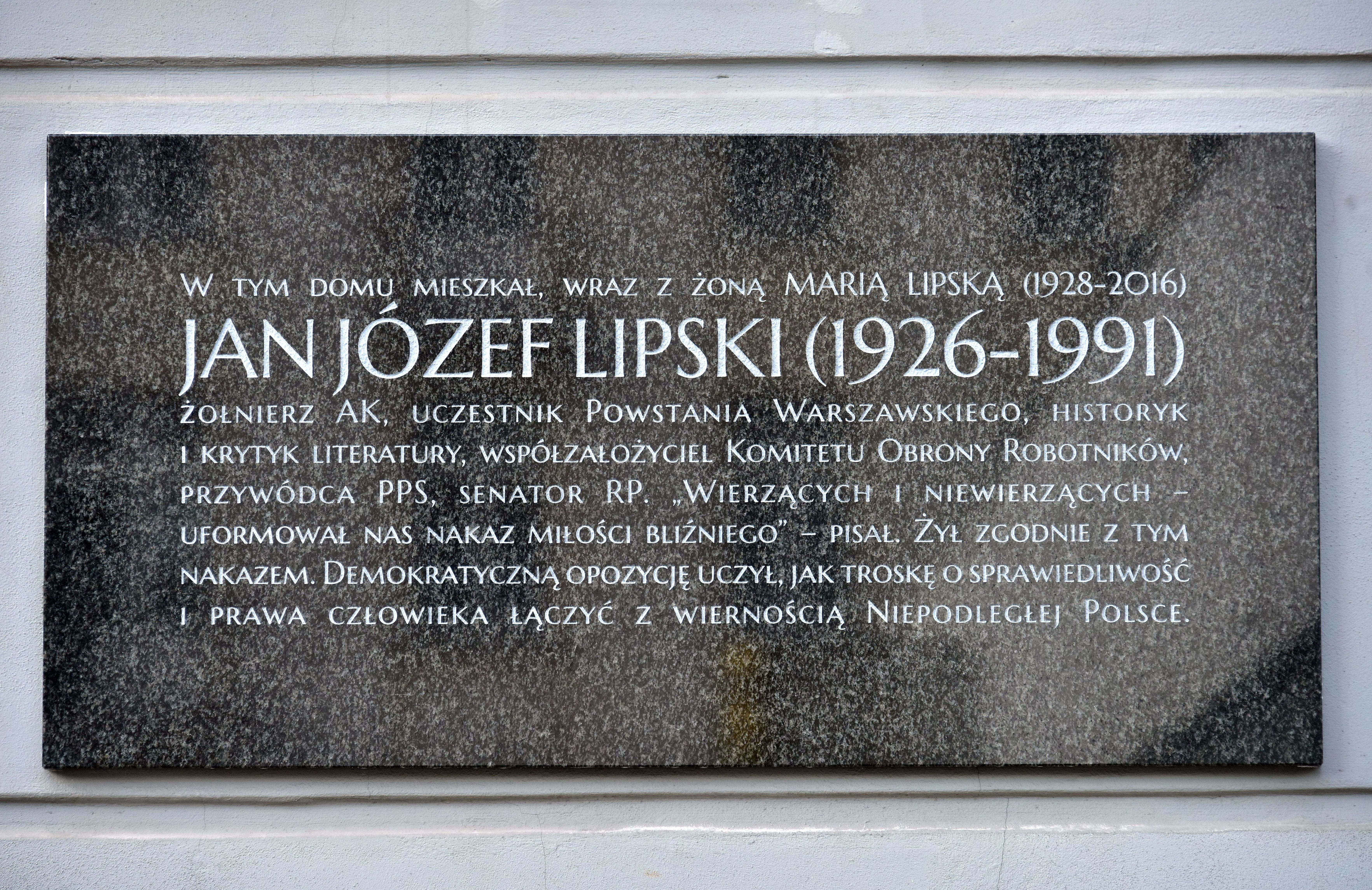 Tablica upamiętniająca Jana Józefa Lipskiego przy ul. Konopczyńskiego 4a w Warszawie